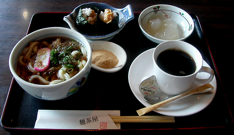 撮影者：小太刀 愛知県のモーニングの一例です。ここは愛知県岡崎市八帖北町にある麺茶屋という饂飩屋です。モーニングサービスを行っていますが、喫茶店ではありません。饂飩屋のモーニングなのでうどんです。左奥にあるのは天むすで、右奥にあるのはわらび餅です。真ん中にあるのはわらび餅につけるきな粉です。右手前がブレンドコーヒーです。左手前が普通のうどんです。2007年6月現在朝9時～10時半まで480円です。わらび餅や天むすをサラダやウインナーに置き換えたセットもあります。